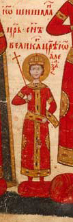 Цар Иван Шишман. Миниатюра от Лондонското евангелие на Иван-Александър